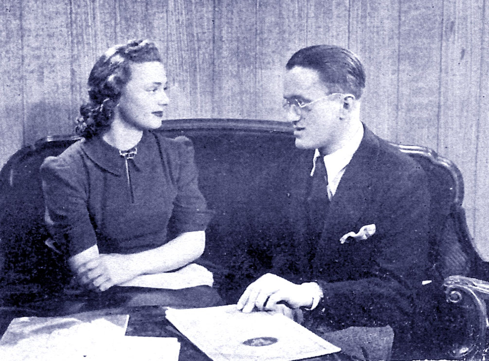 Luisella Beghi e Silvio Bagolini in Piccolo hotel (Balerini, 1939).